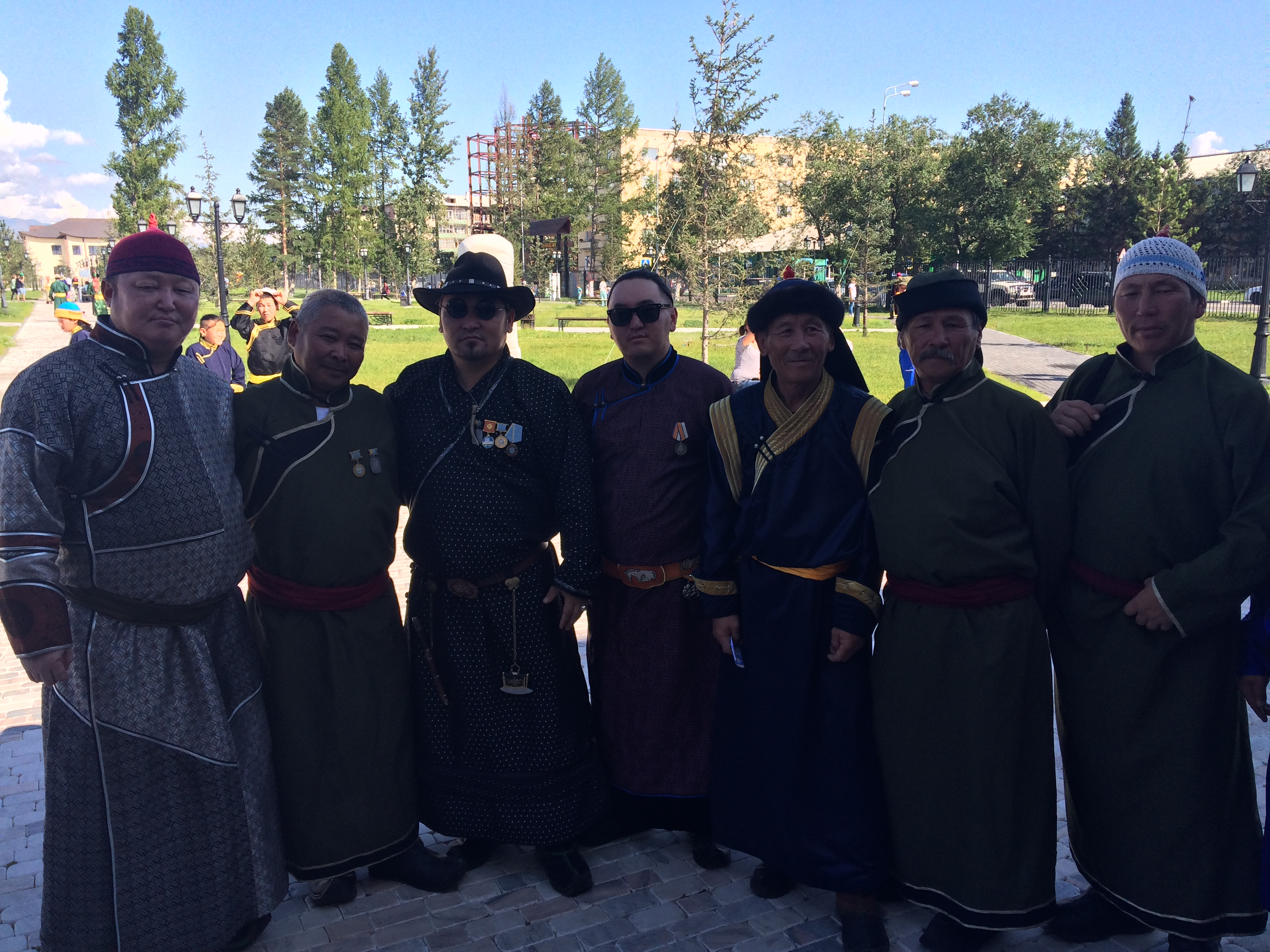 Мастера хоомея. Культурный комплекс Центр Азии, Республика Тыва